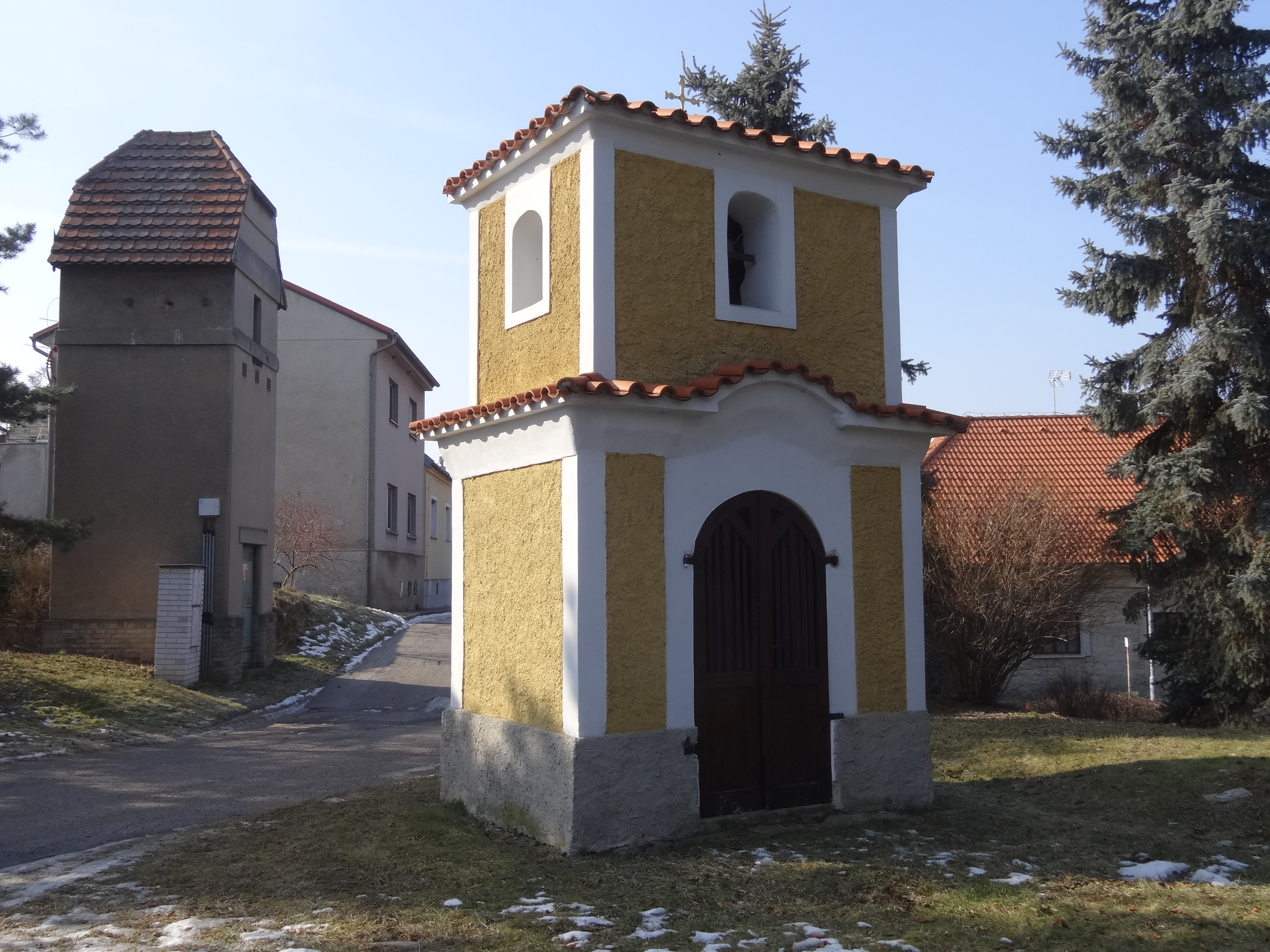 Kaple, náves, Hrdlív.